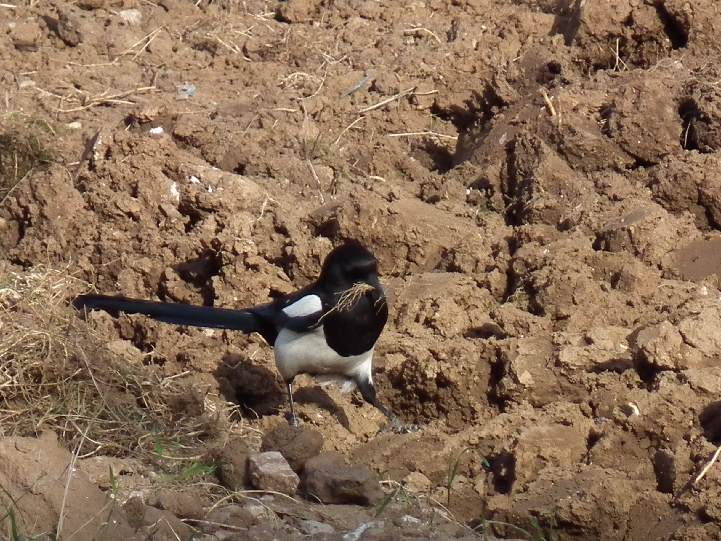 Elster (Pica pica) beim Sammeln von Nistmaterial, fotografiert in Heidelberg (Baden-Württemberg, Deutschland)